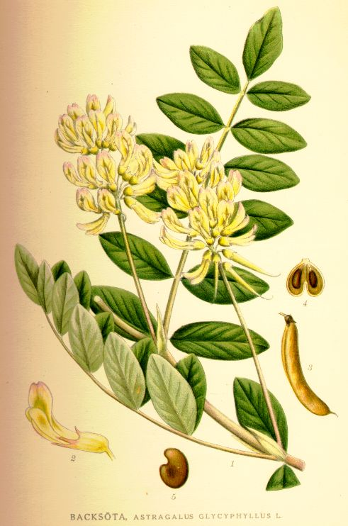 Astragalus glycyphyllos